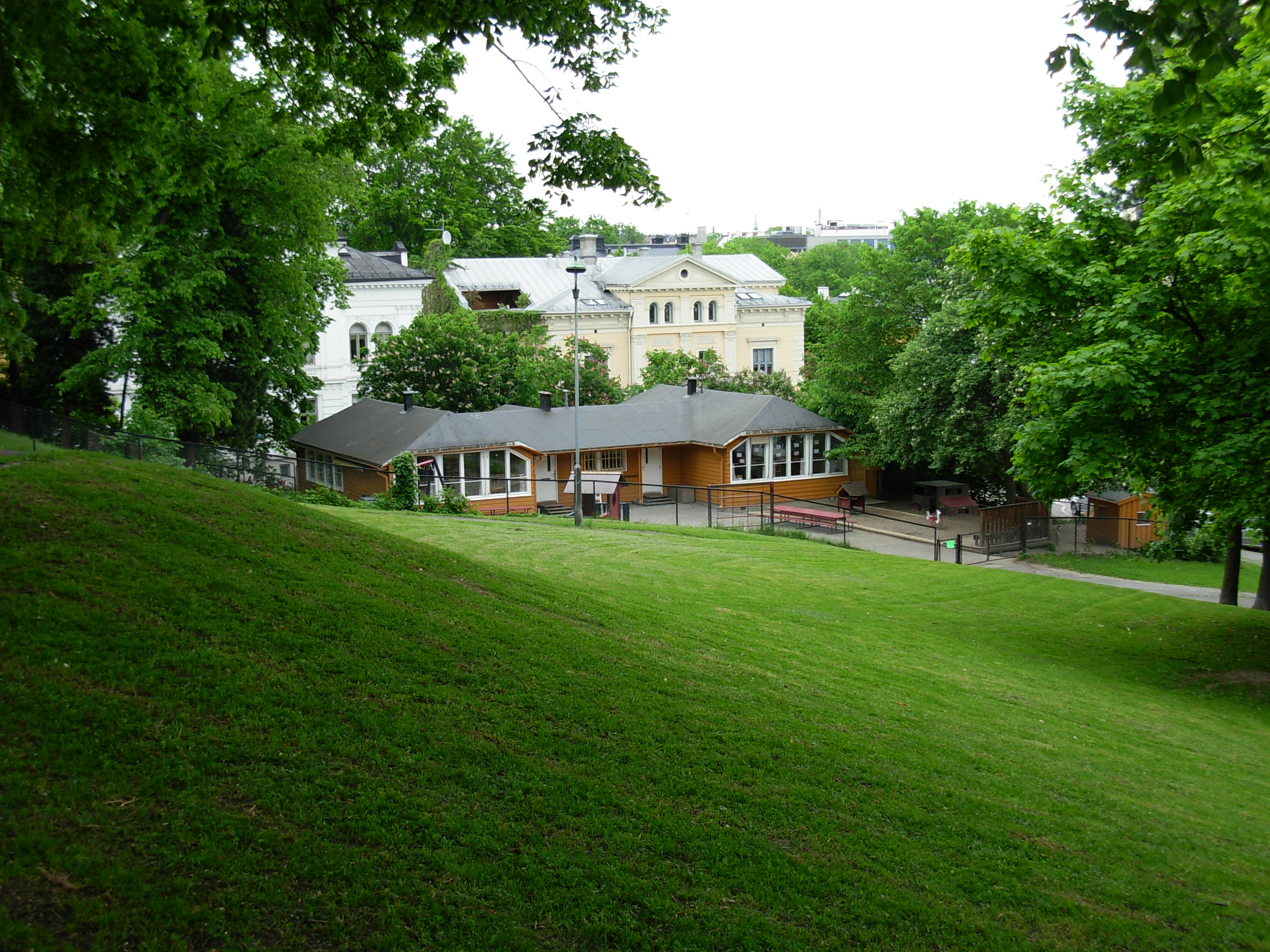 Uranienborgparken - skråningen mot barnehagen